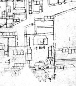 乾隆十五年（1750年）完成的《乾隆京城全图》中的同福寺及其附近地区。本图来自清內務府藏京城全圖，故宮博物院影印，民國二十九年十二月（1940年）。